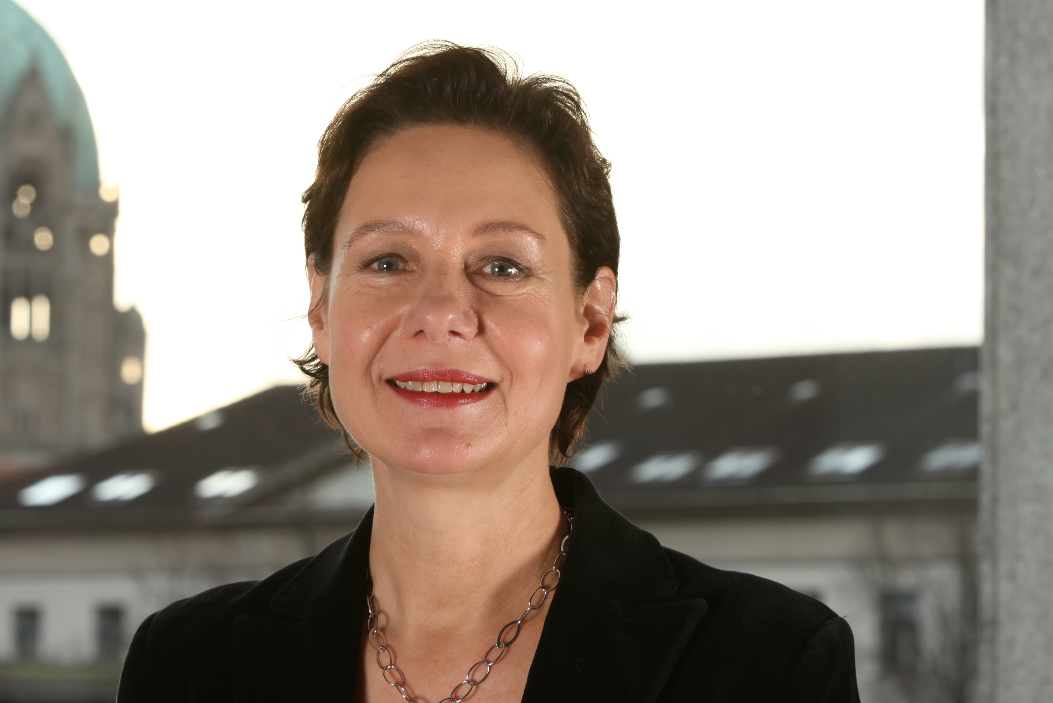 Dorothee Prüssner, Abgeordnete im niedersächsischen Landtag (CDU)